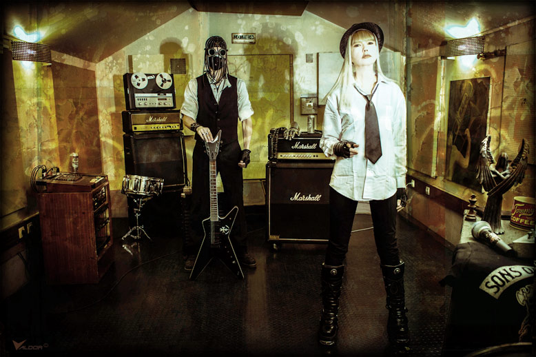 photopress from "Rage" by Valdor